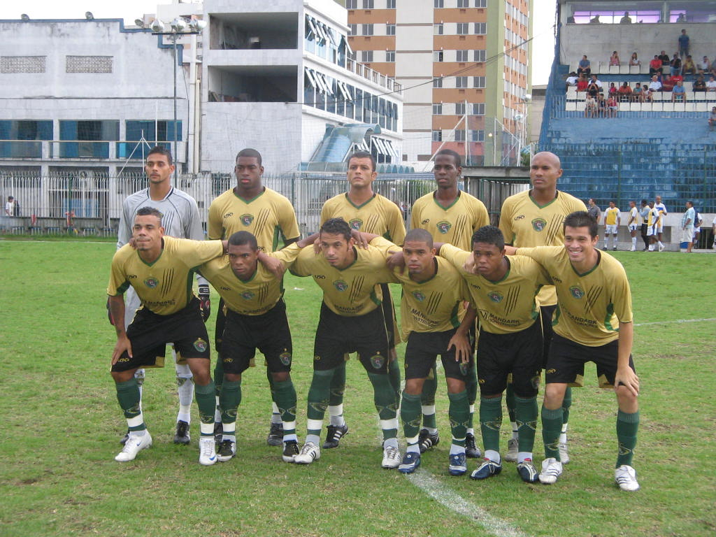 Equipe profissional do Tigres do Brasil, em 2008. Foto de Paulo Roberto Rodrigues.